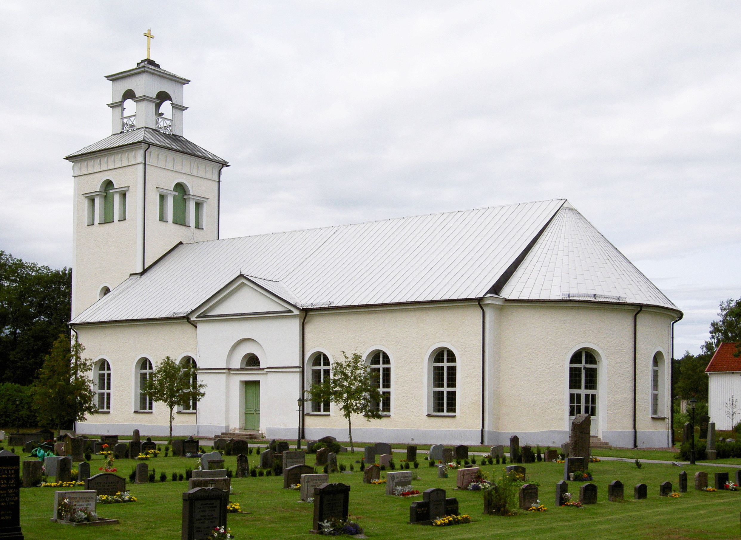 Rumskulla kyrka